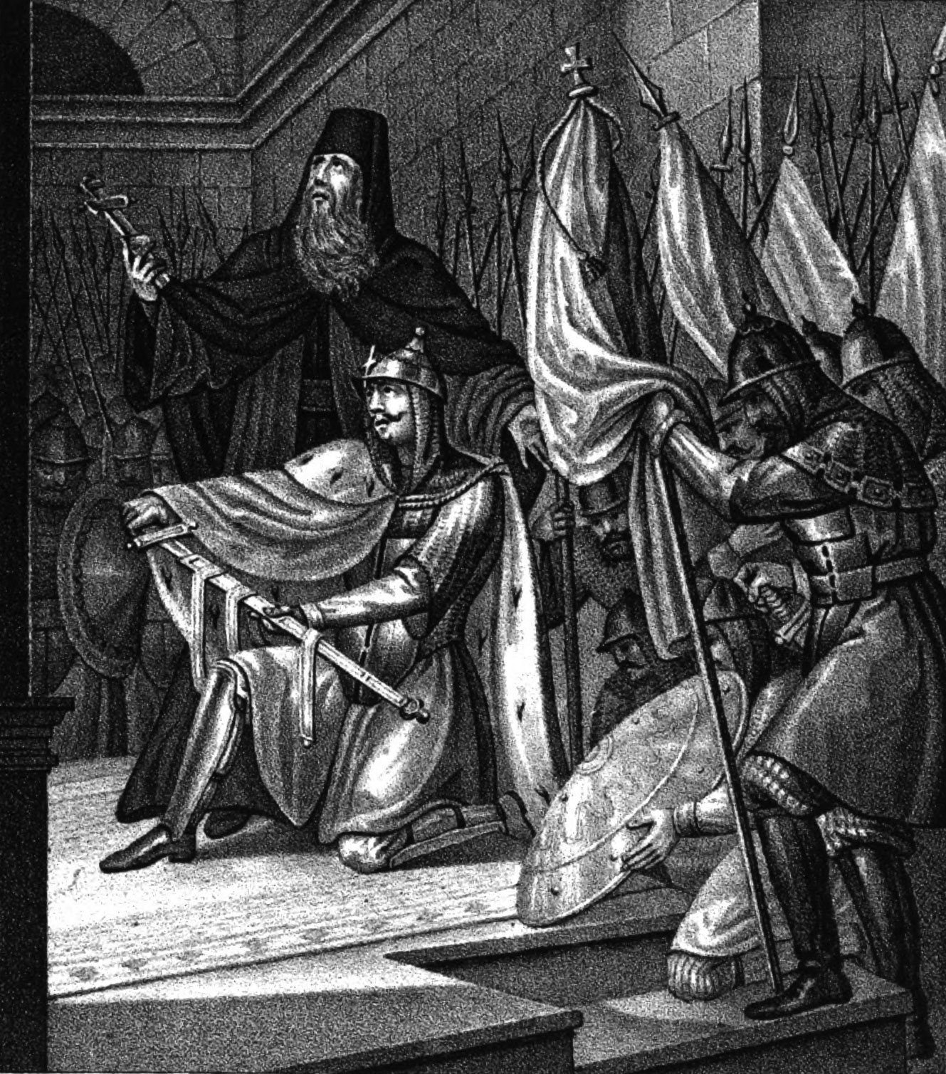 Беларуская (тарашкевіца): Клятва Даўмонта Пскоўскага (Daŭmont Pskoŭski)